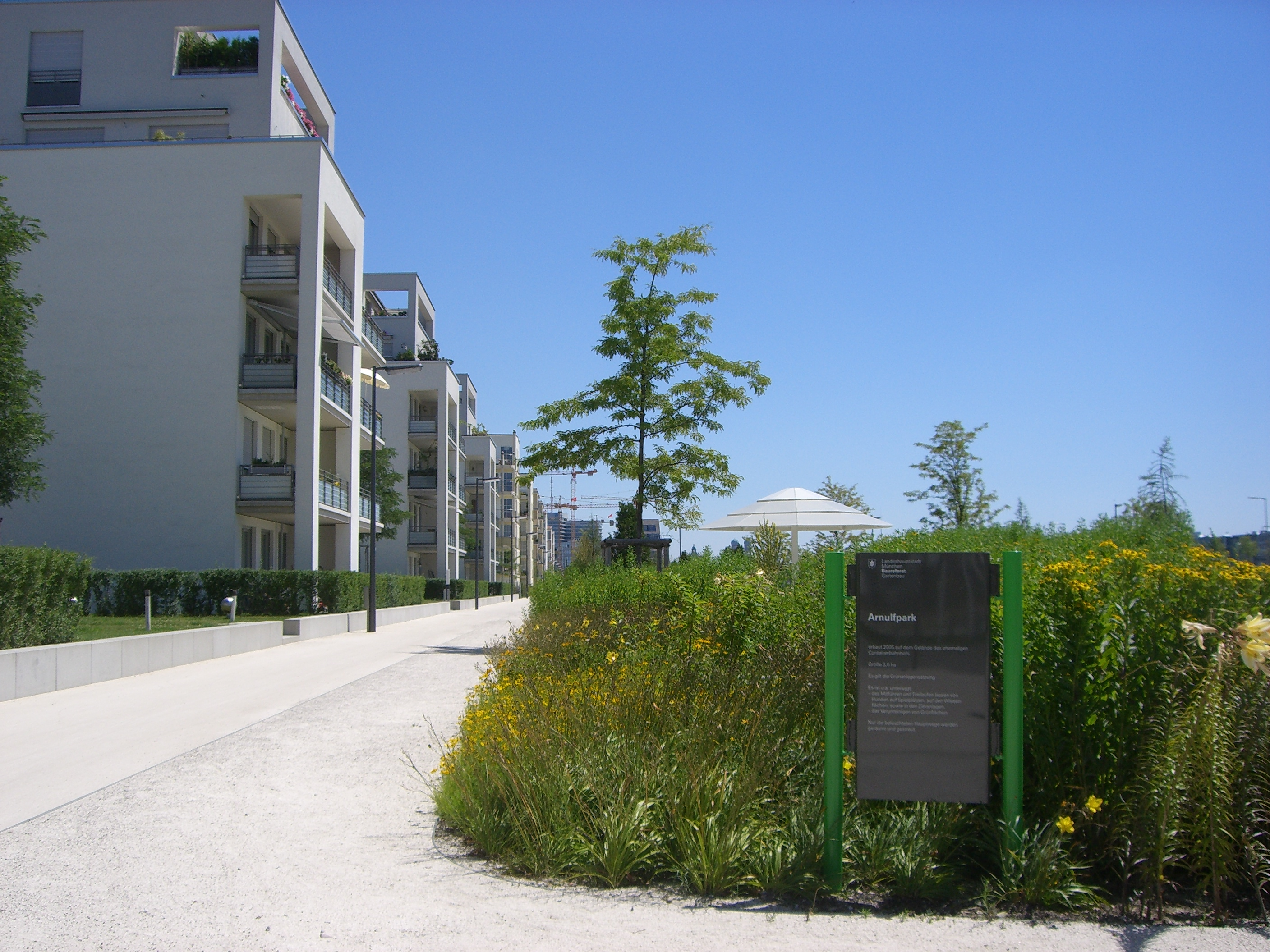 München - Arnulfpark (mit Schild)